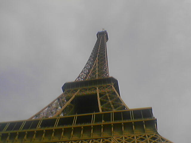 La Tour d'Eiffel